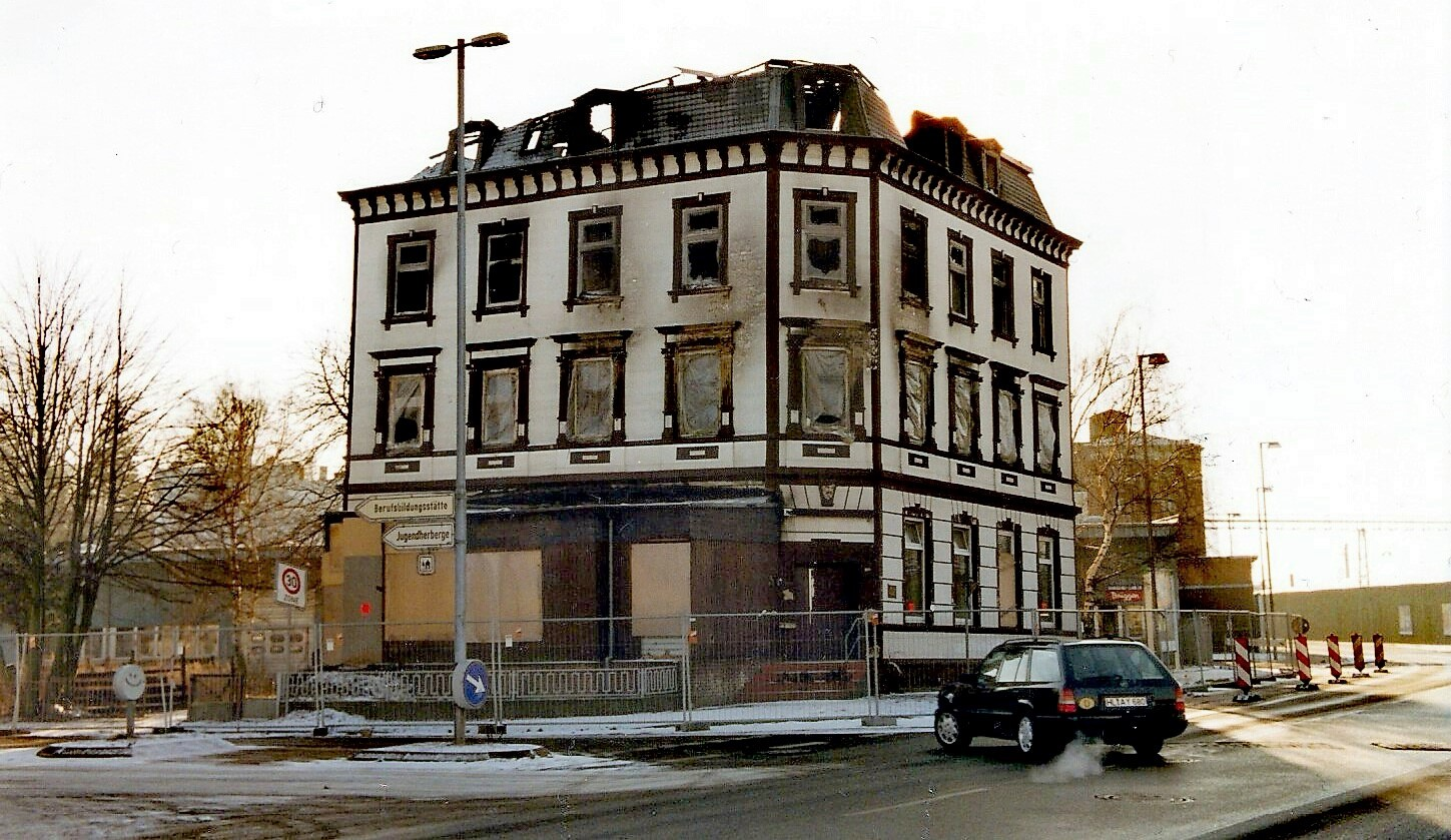 Das Gebäude in der Hafenstraße 52 nach dem Anschlag.